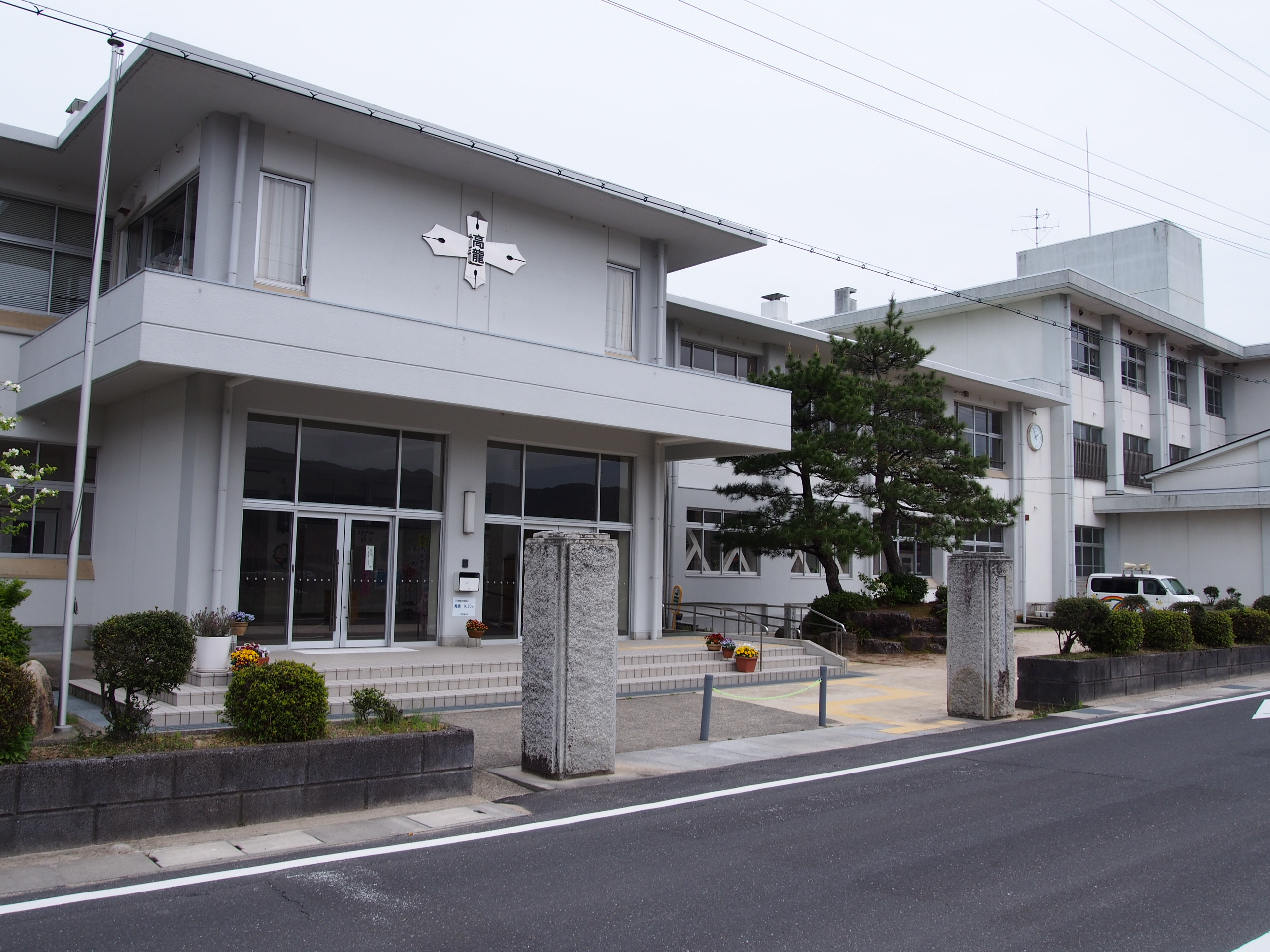 京丹後市立高龍中学校（現高龍小学校）京都府京丹後市久美浜町新谷